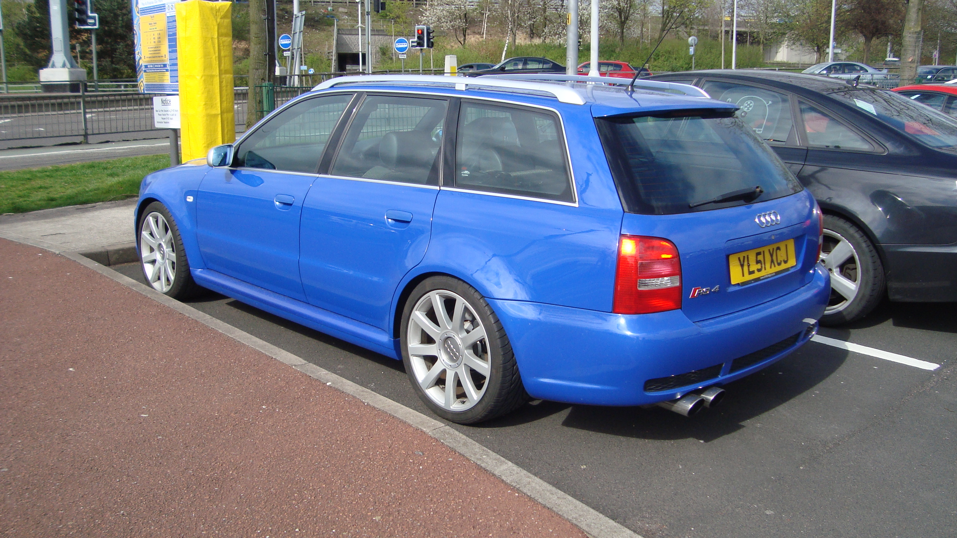 2001 Audi RS4 Avant